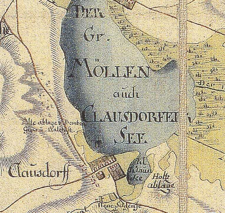 Karte von Klausdorf (Ortsteil der Gem. Am Mellensee, Brandenburg, Deutschland), aus den Jahren 1767 bis 1787, Land Brandenburg, Deutschland